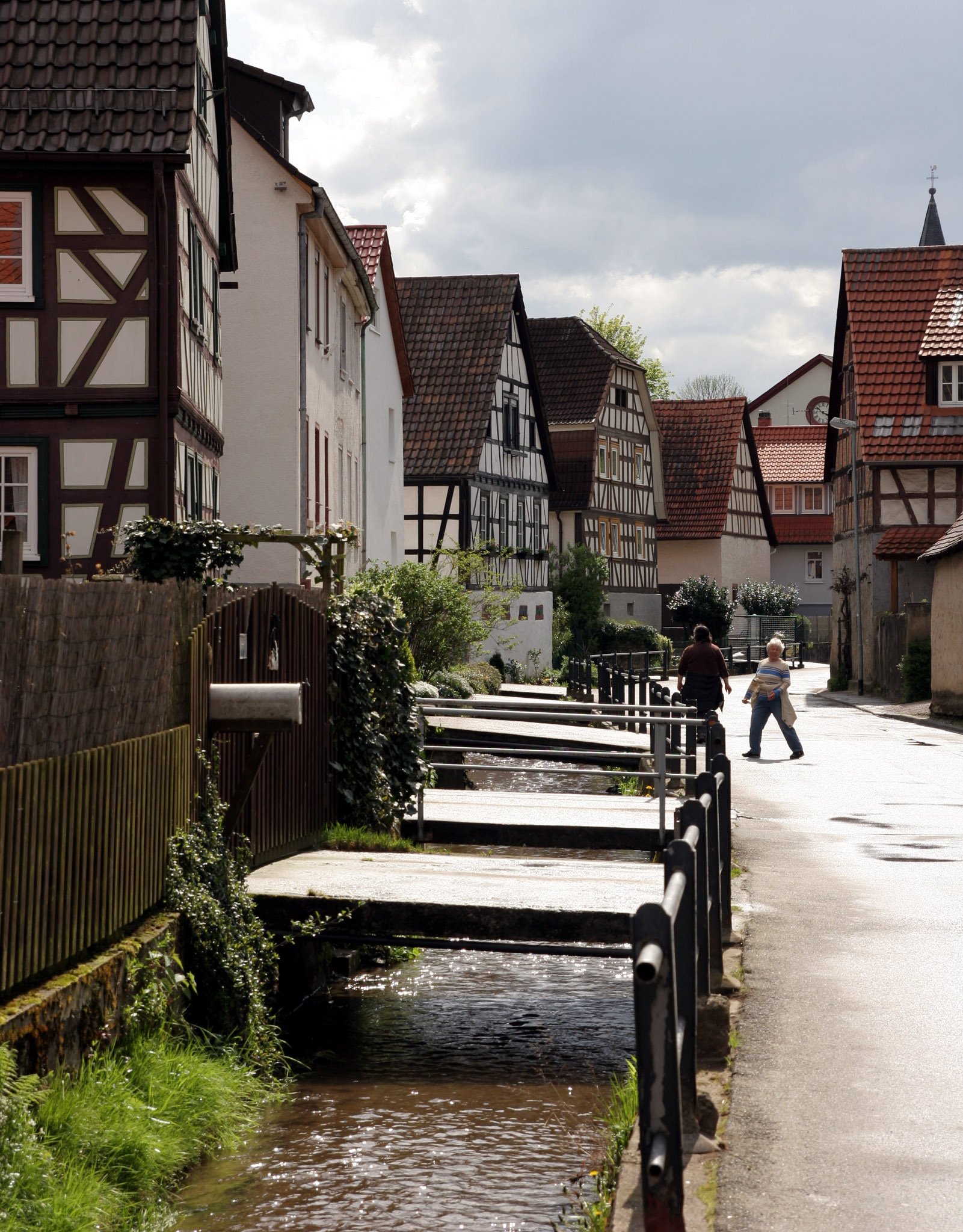 Der Bensheimer Stadtteil Gronau